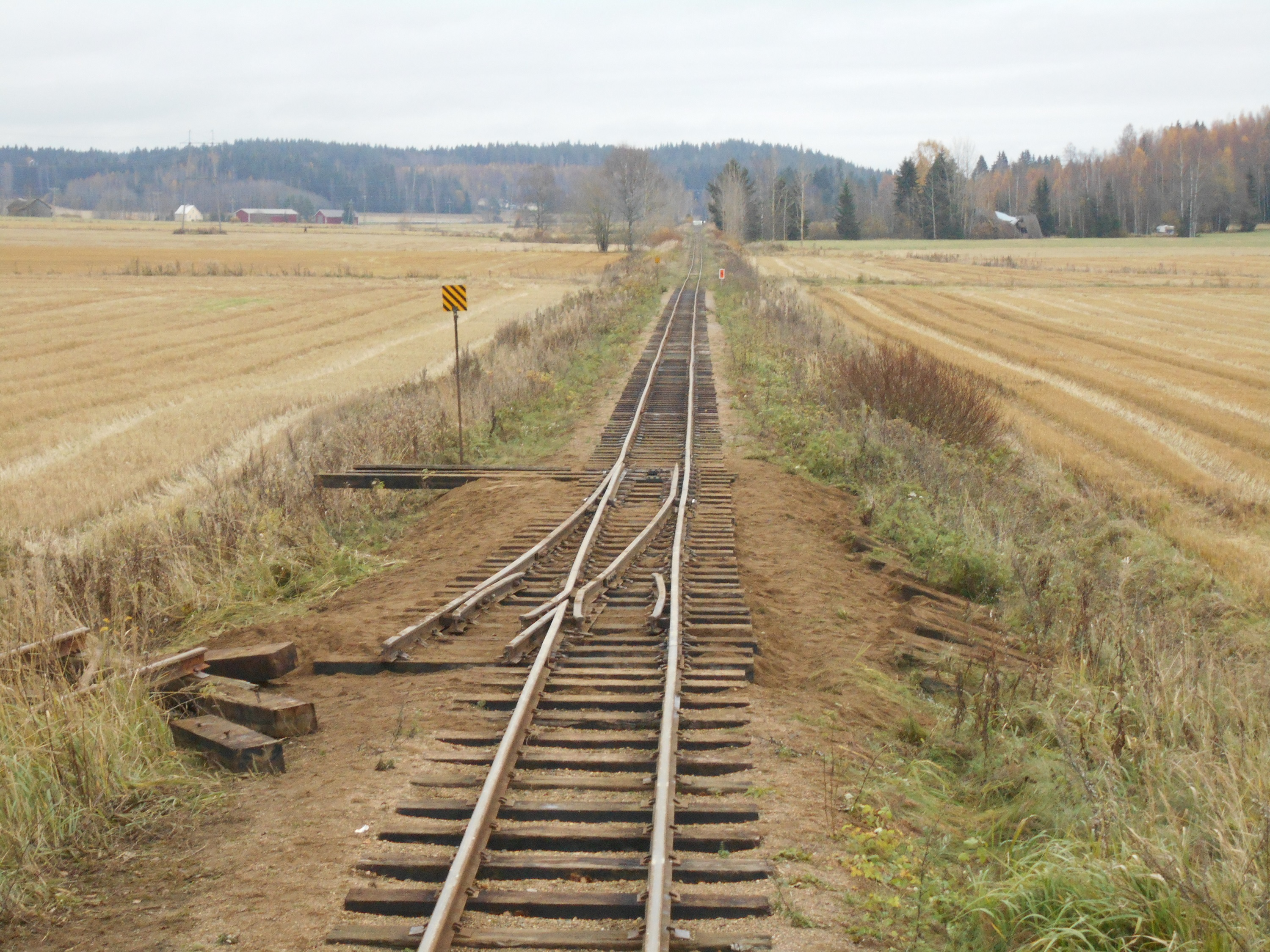 Kuva Santavaihteen vaihdetyömaalta